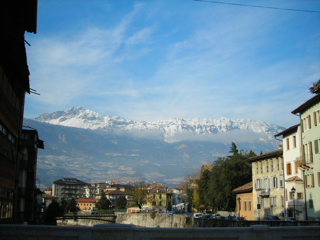 Rovereto